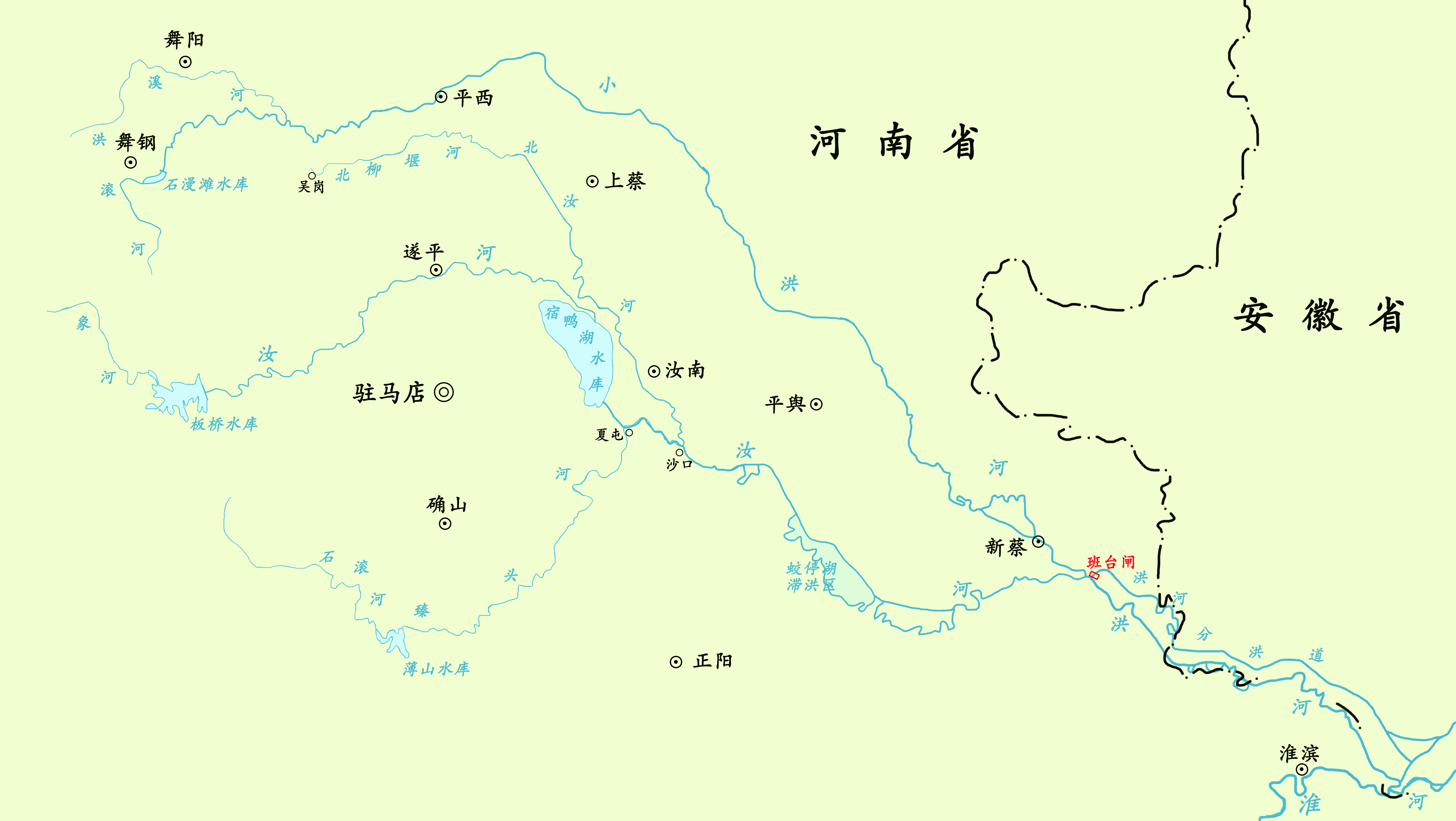 位于中国河南和安徽交界处的洪河干流及其主要支流示意图。